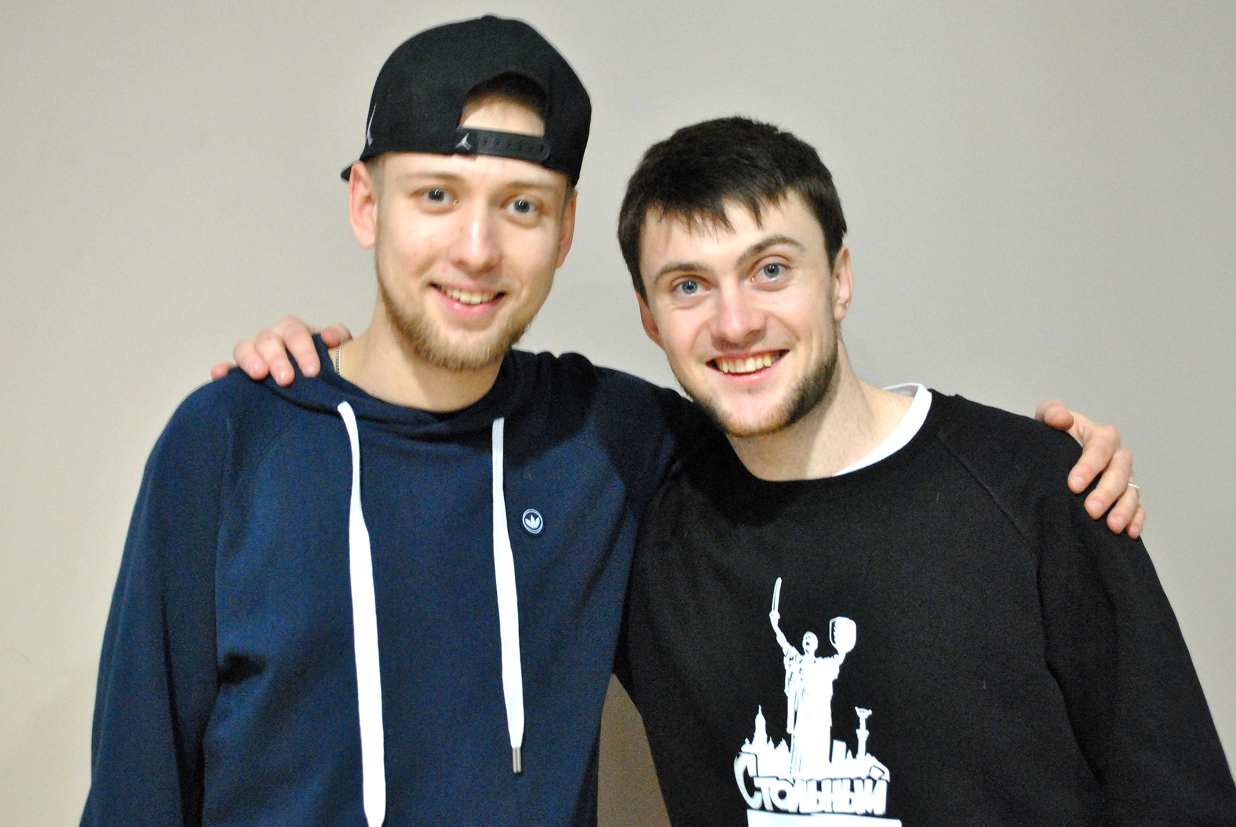 Українські музиканти, що працюють у жанрі хіп-хоп MC Tof та ЯрмаК (справжнє ім'я — Олександр Валентинович Ярмак).